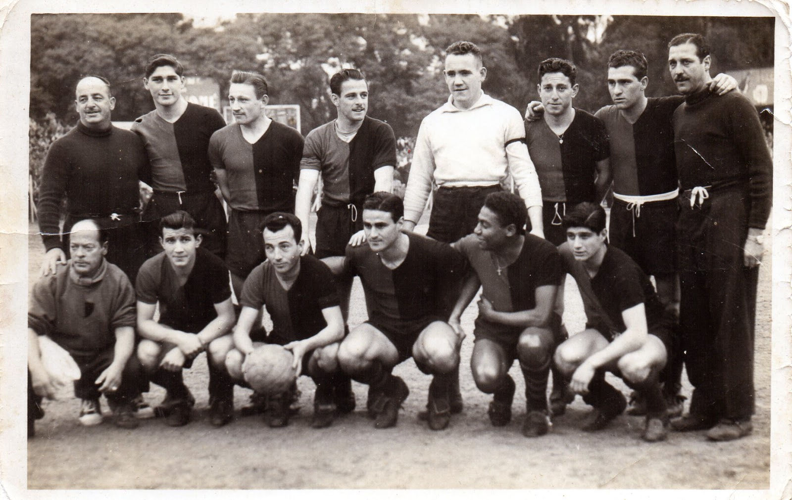 José Ramos entrenador de Newell's Old Boys 1955, junto al Profe Más, Jorge Griffa, Marassi (Auxiliar), Nardiello, Bernardo, Picot y José Yudica